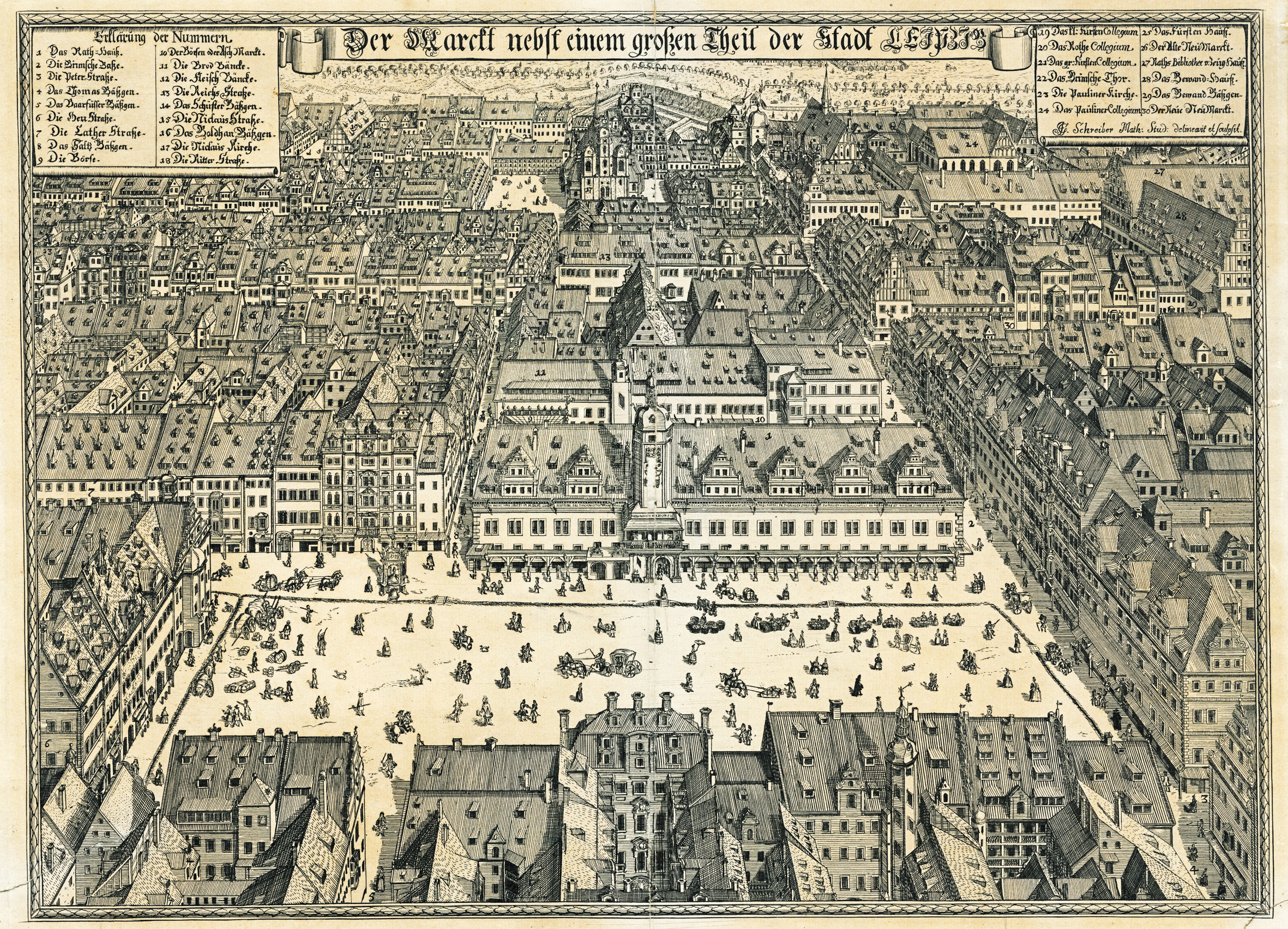 Ansicht des Leipziger Marktes, Kupferstich, Johann Georg Schreiber (Stecher), 1712